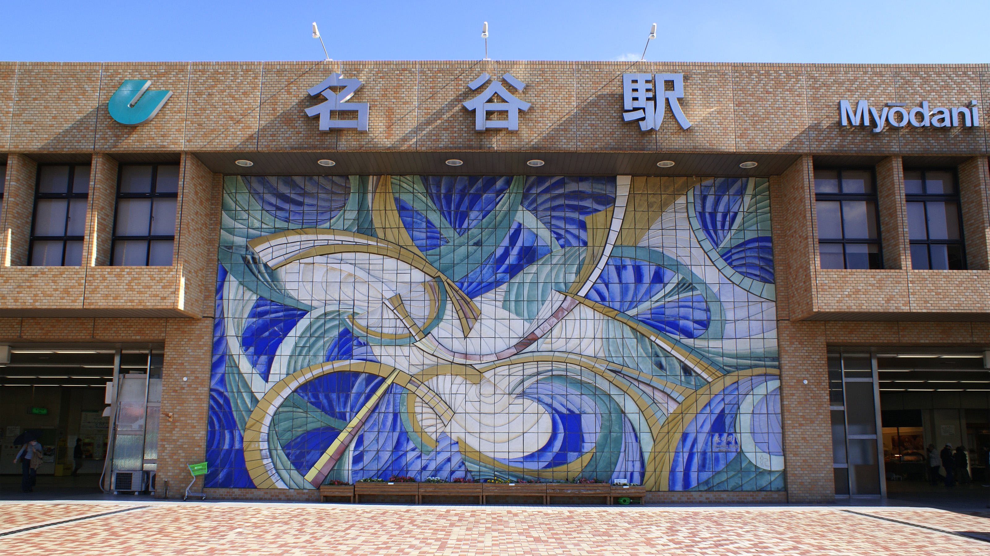 Myodani Station in Kobe, Hyogo, Japan